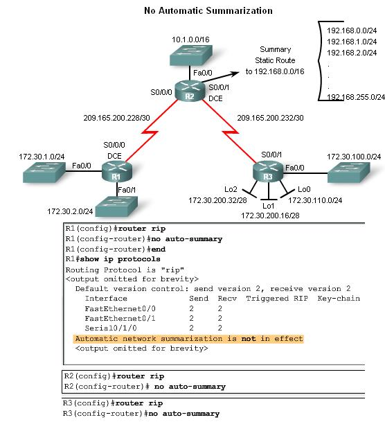 Монгол: аа